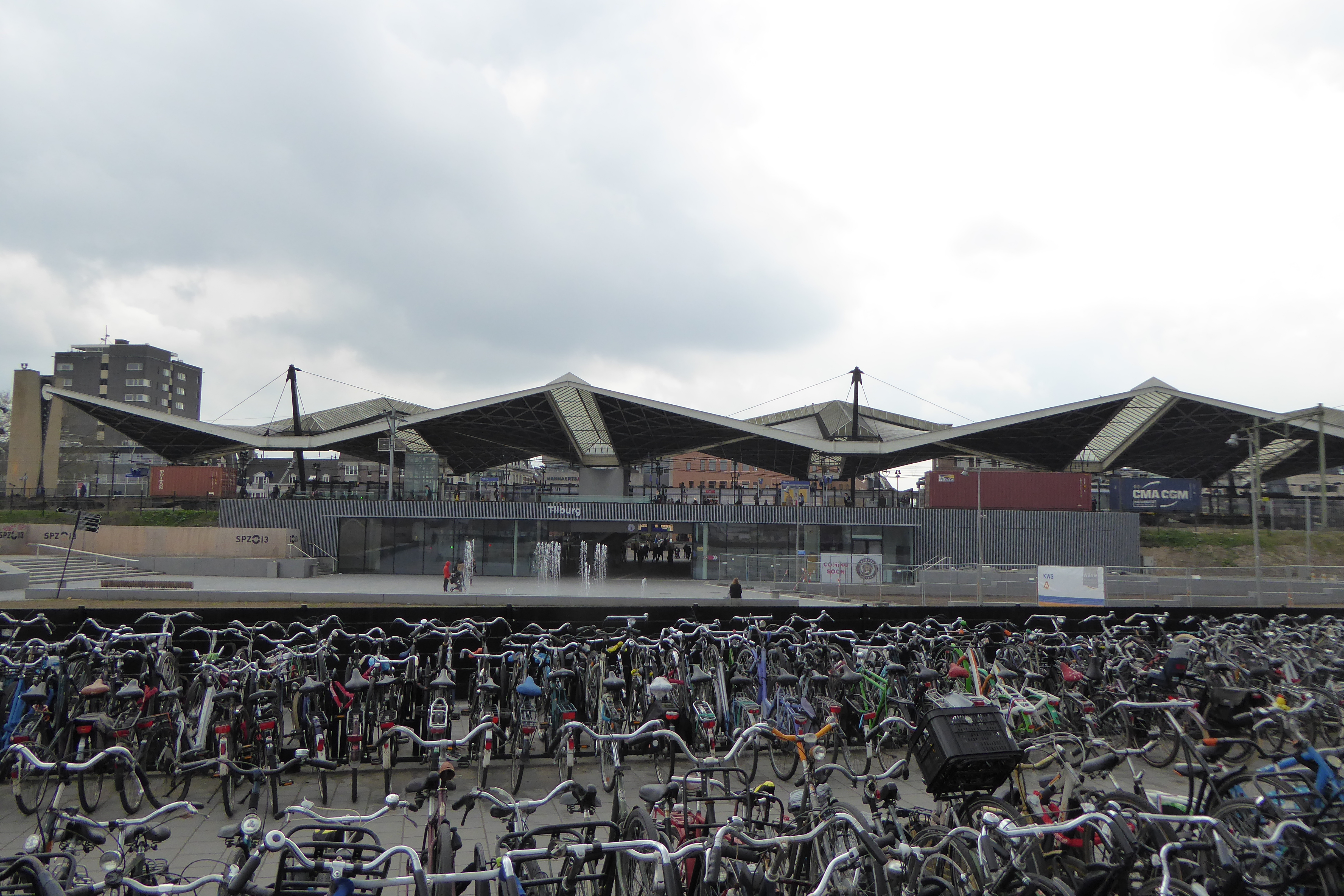 Station Tilburg CS (exterieur) in de Tilburgse Spoorzone. Foto gemaakt tijdens de fotodag van de Bibliotheek Midden-Brabant op 1 april 2017